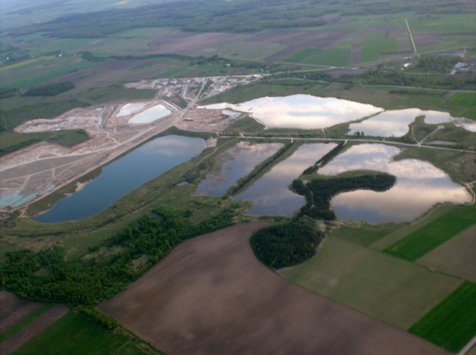 Klovainių dolomito karjeras, Pakruojo raj.